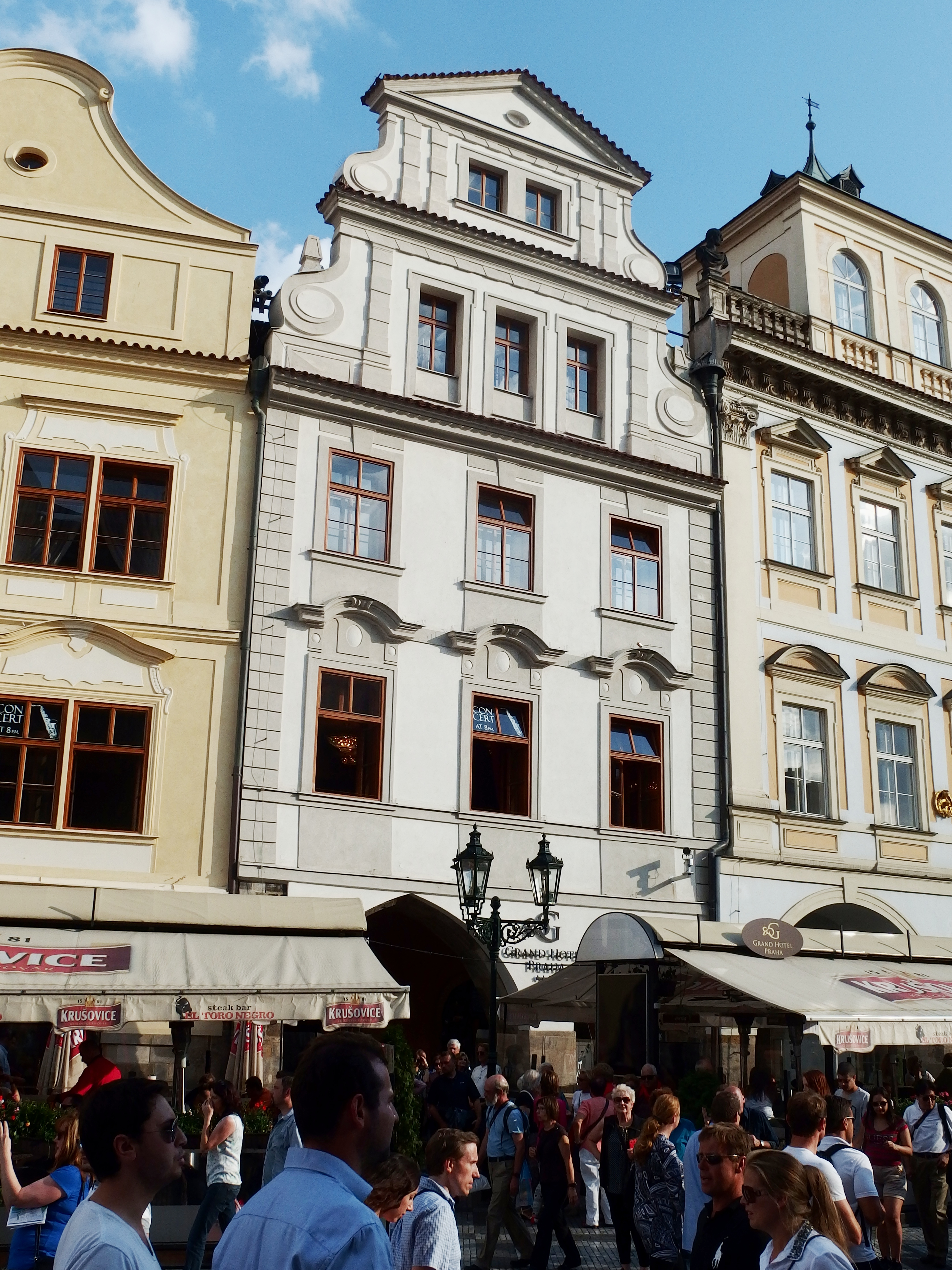 Staroměstské náměstí 22, Staroměstské náměstí 481/22, Kožná 481/11, Staré Město (Praha).